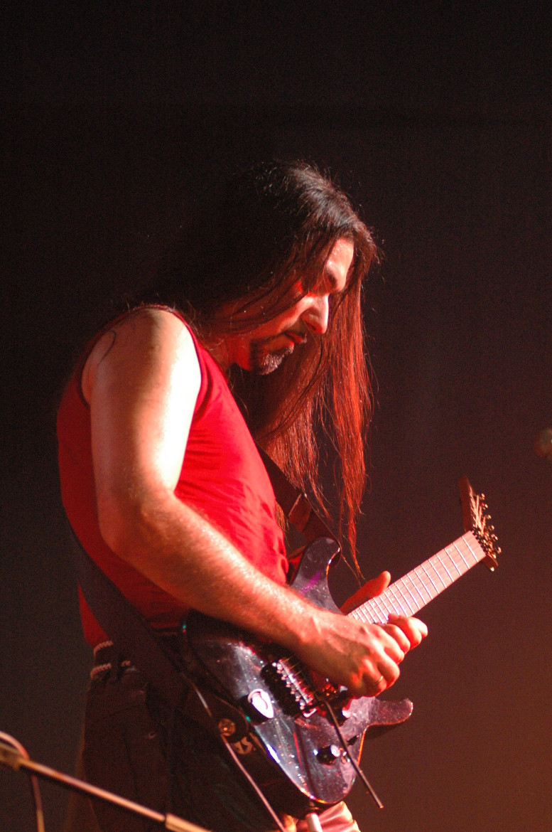 Adi Manolovici în concert